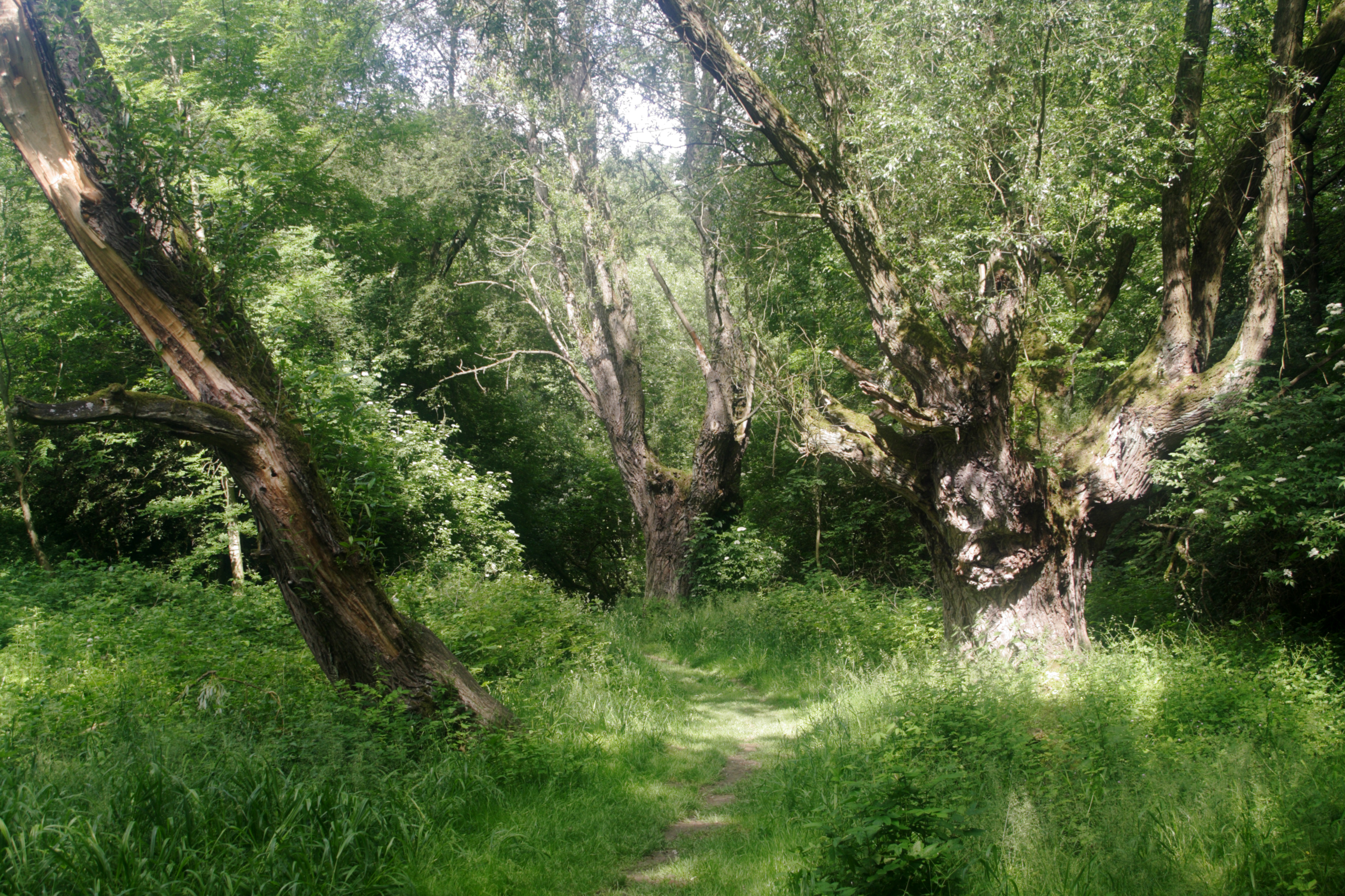 Zaufensgraben - 54 WDPA: 325976 - Alte Weiden